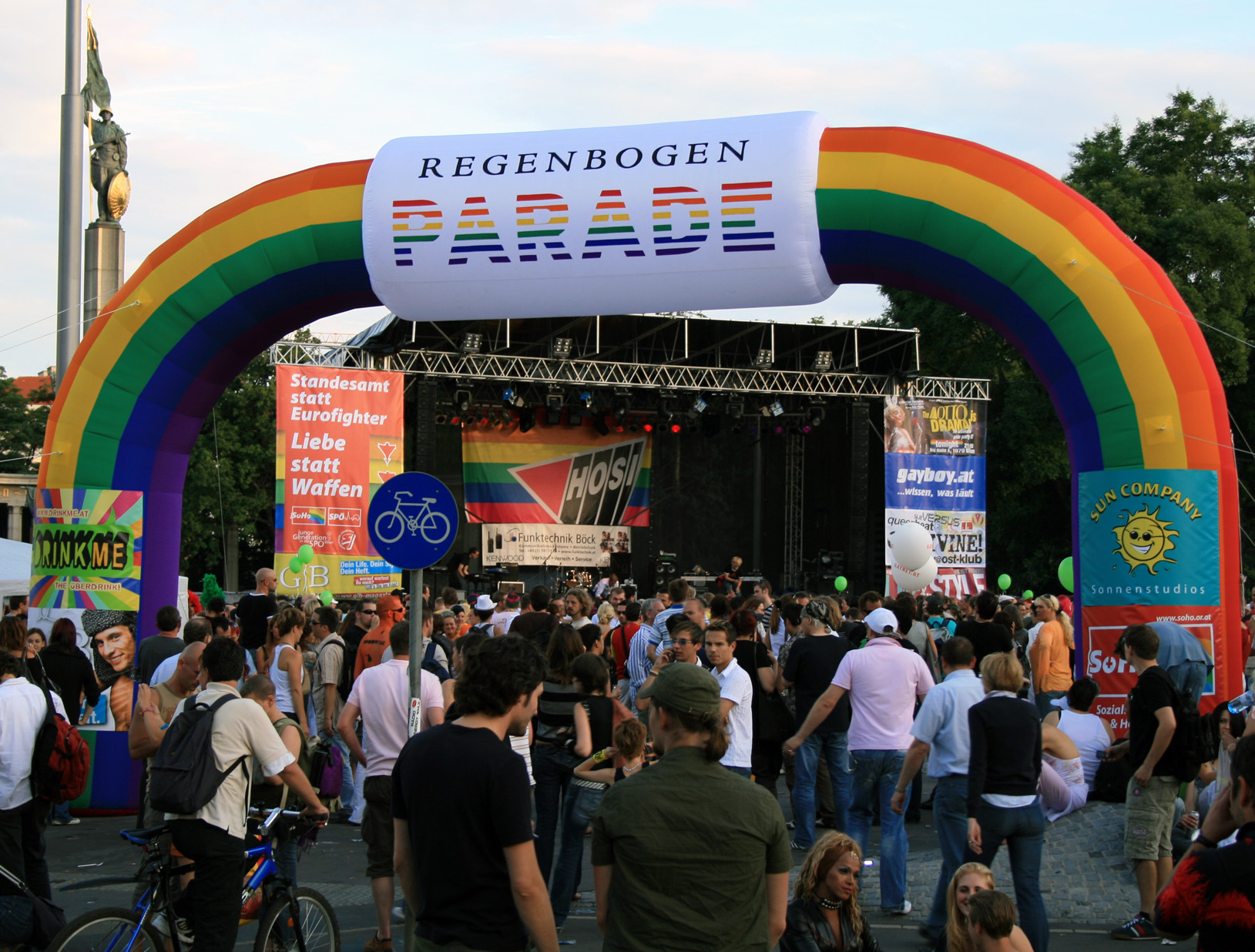 Stage of the Regenbogenparade 2007 at the Schwarzenbergplatz in Vienna, Austria.